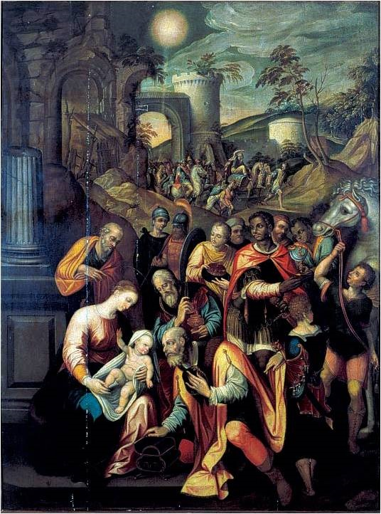 La obra representa el momento en que el Niño Jesús fue adorado por los tres Reyes magos.